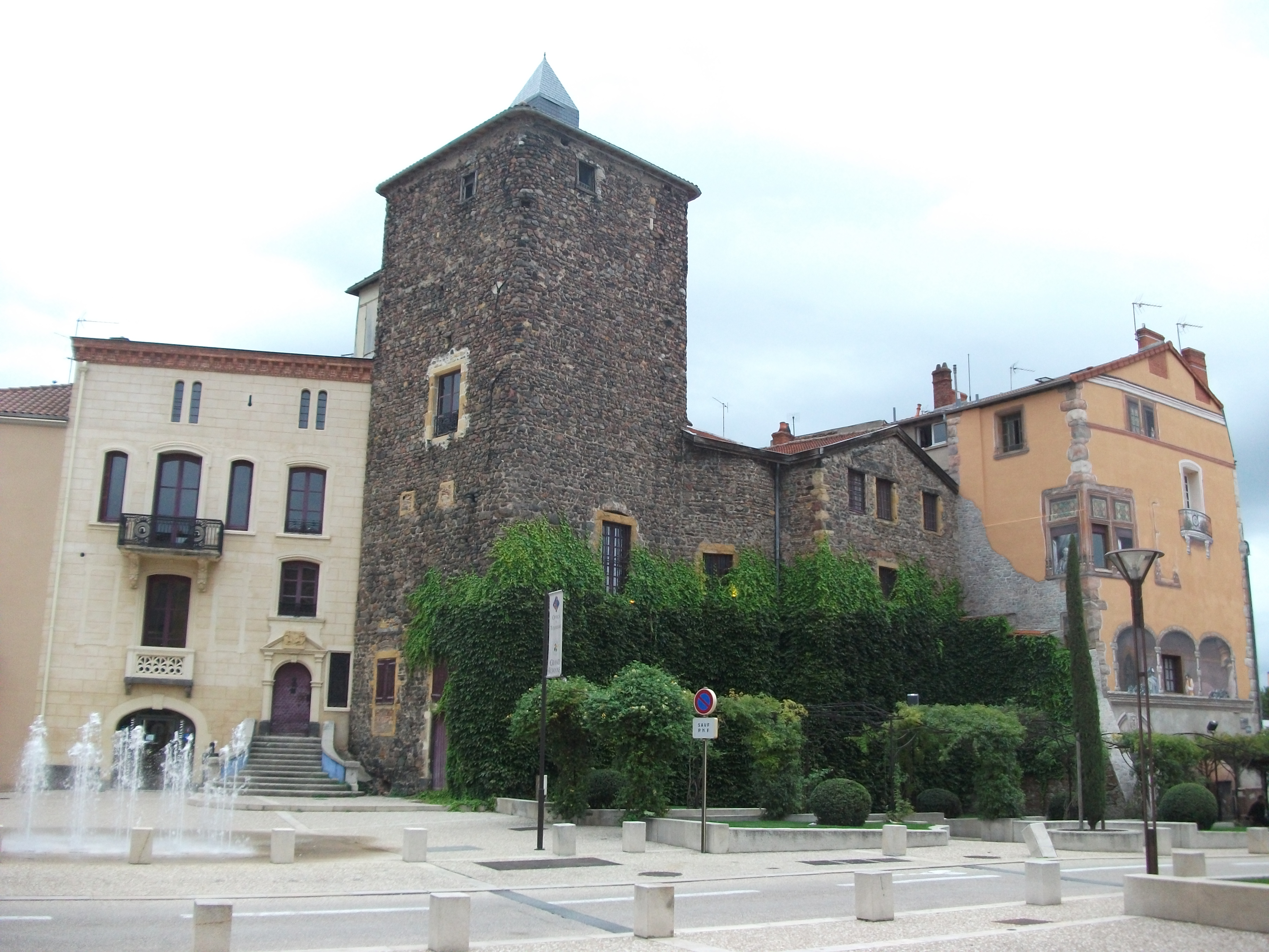 Château de Roanne, (Inscrit, 1930) .